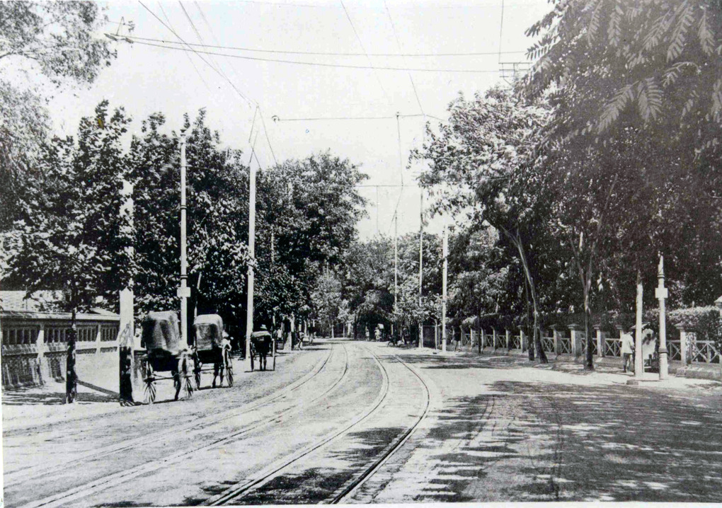 中文（中国大陆）: 静安寺路，今南京西路